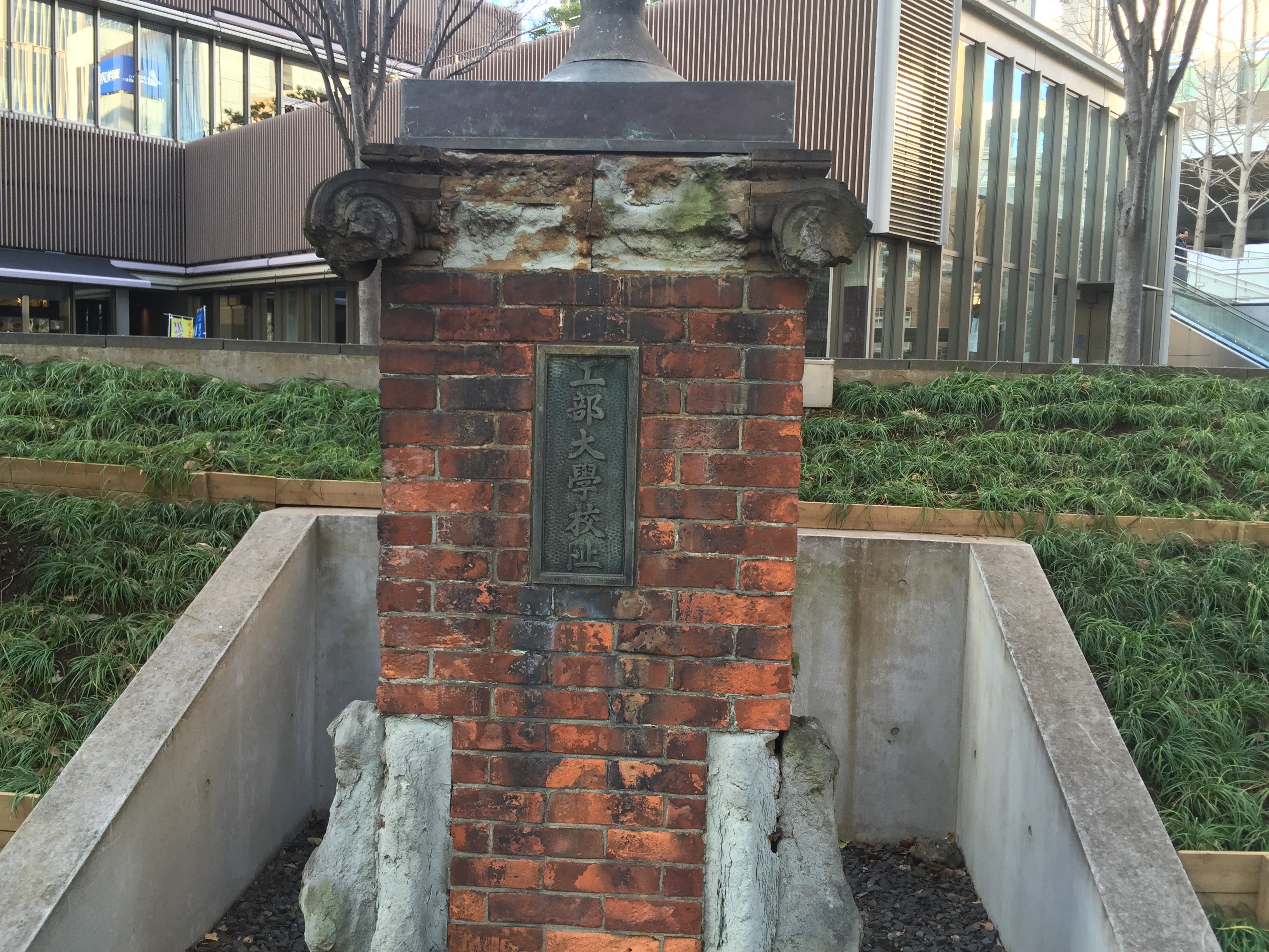 工部大学校址